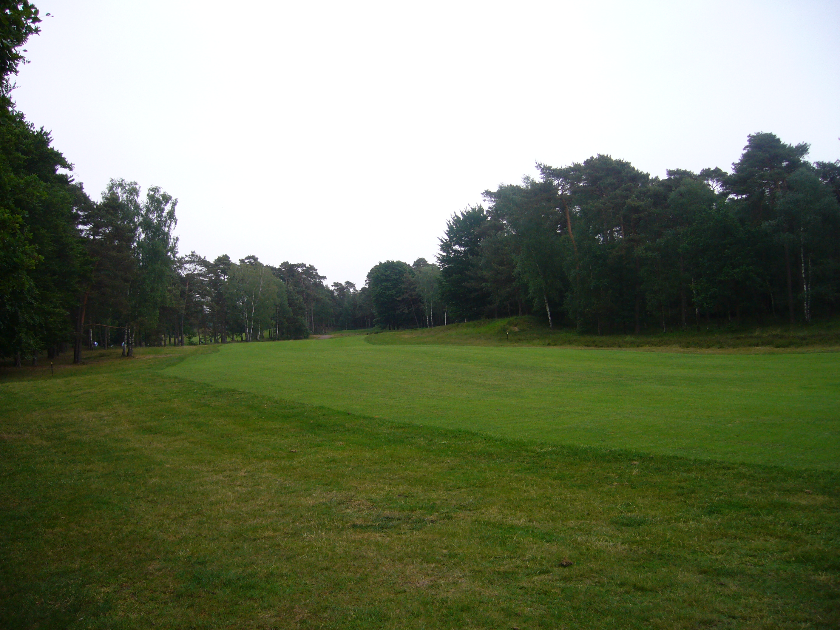 Rosendaelsche GC, Hole 18